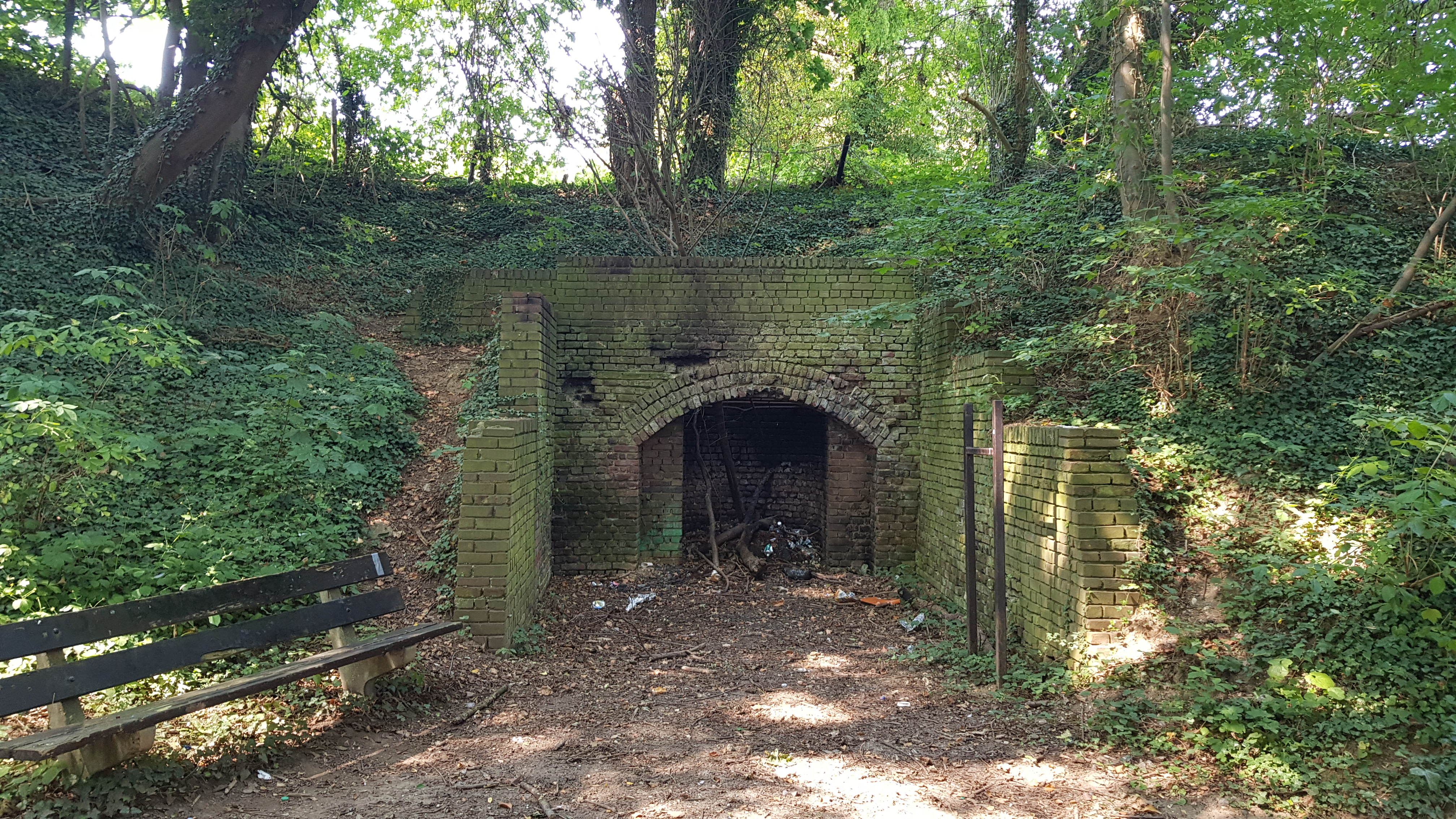 Kalkoven Koffiepotje, Ubachsberg, Nederland